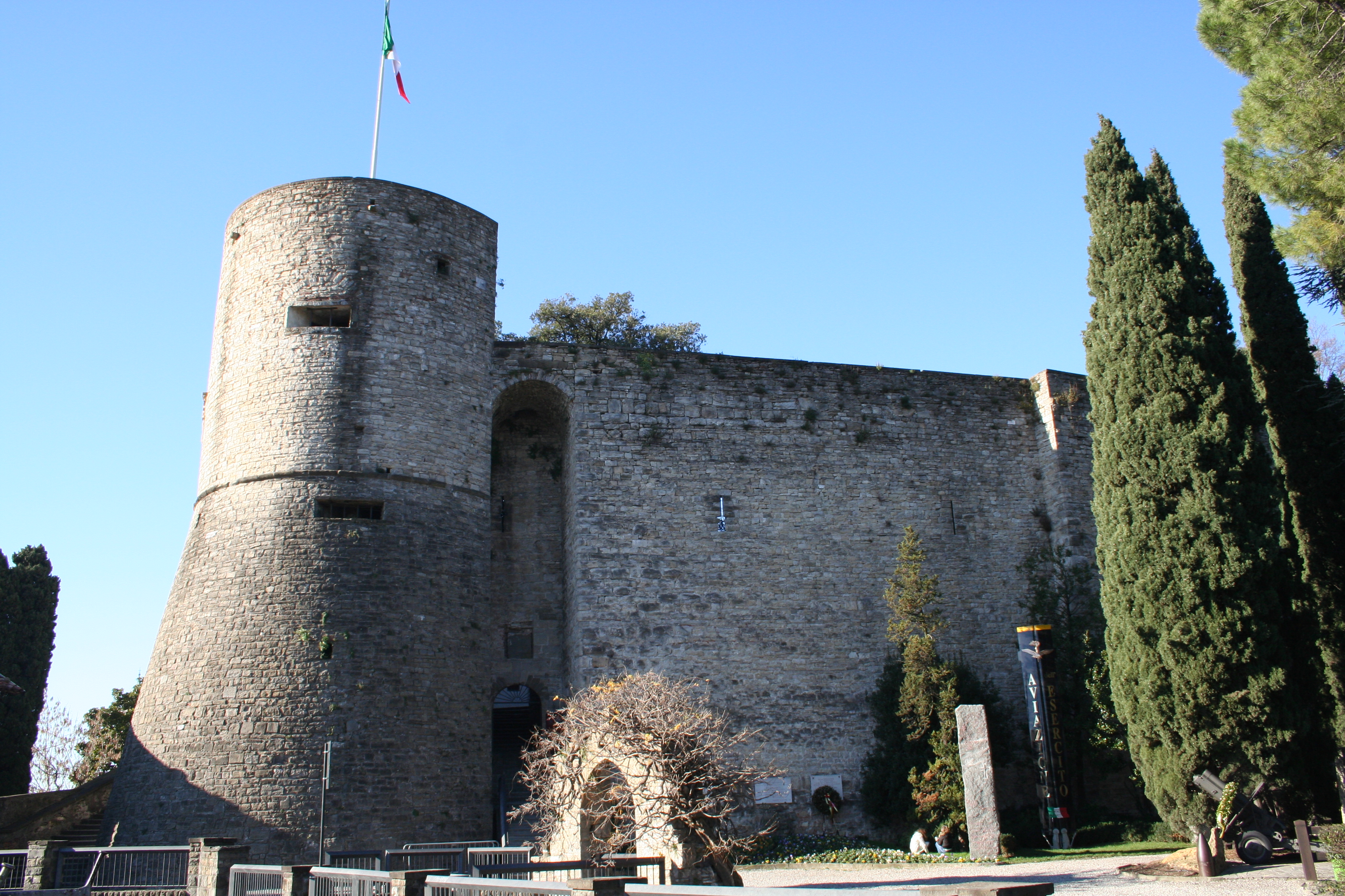 Il mastio della Rocca di Bergamo. Fotografia di Giorces.